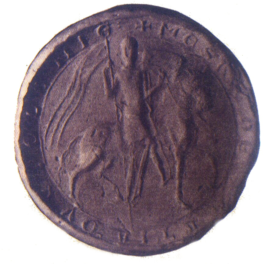 Pieczęć Mieszka III Starego